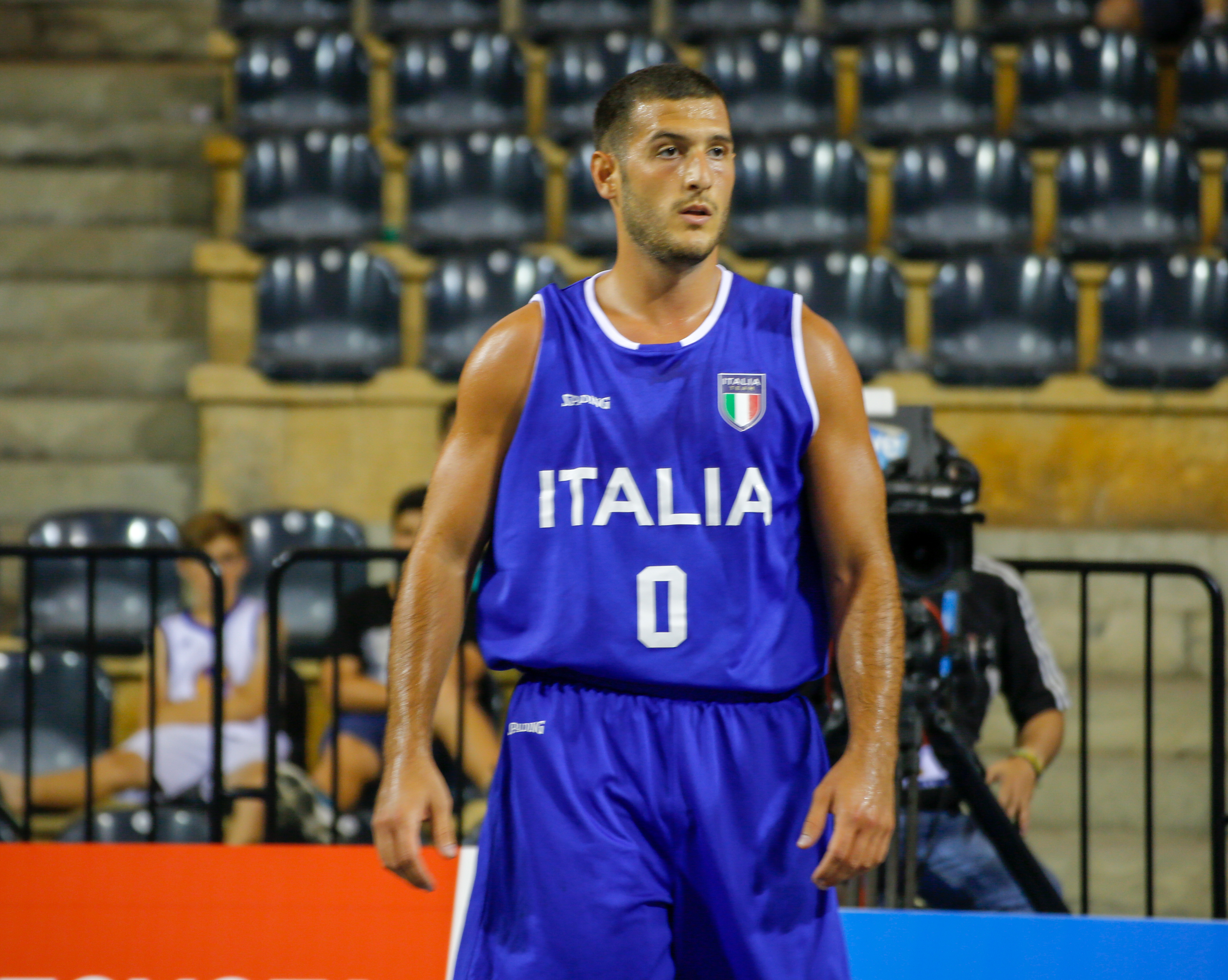 Marco Spissu en los Juegos del Mediterráneo 2018